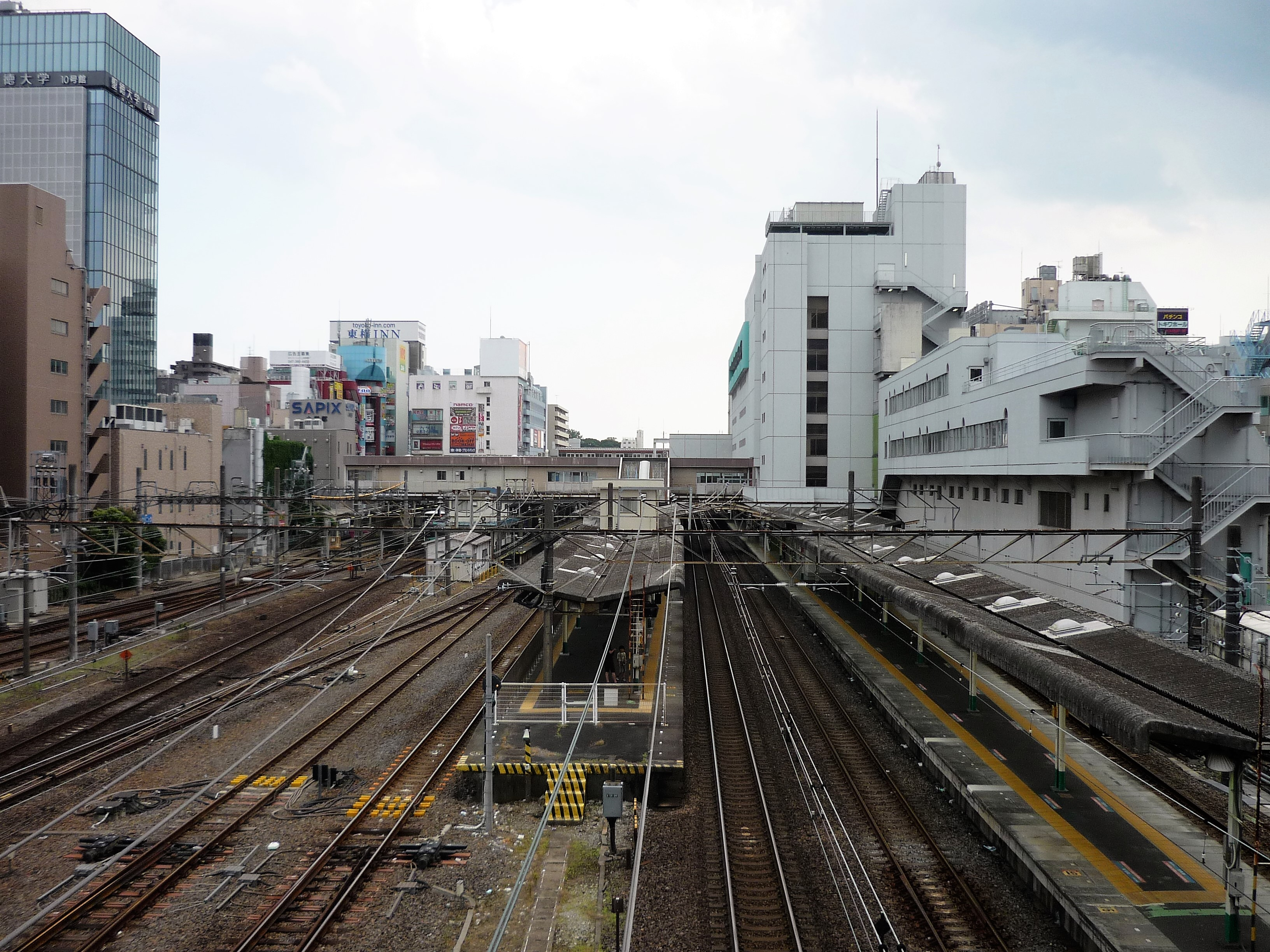 松戸駅構内（駅北側陸橋より）